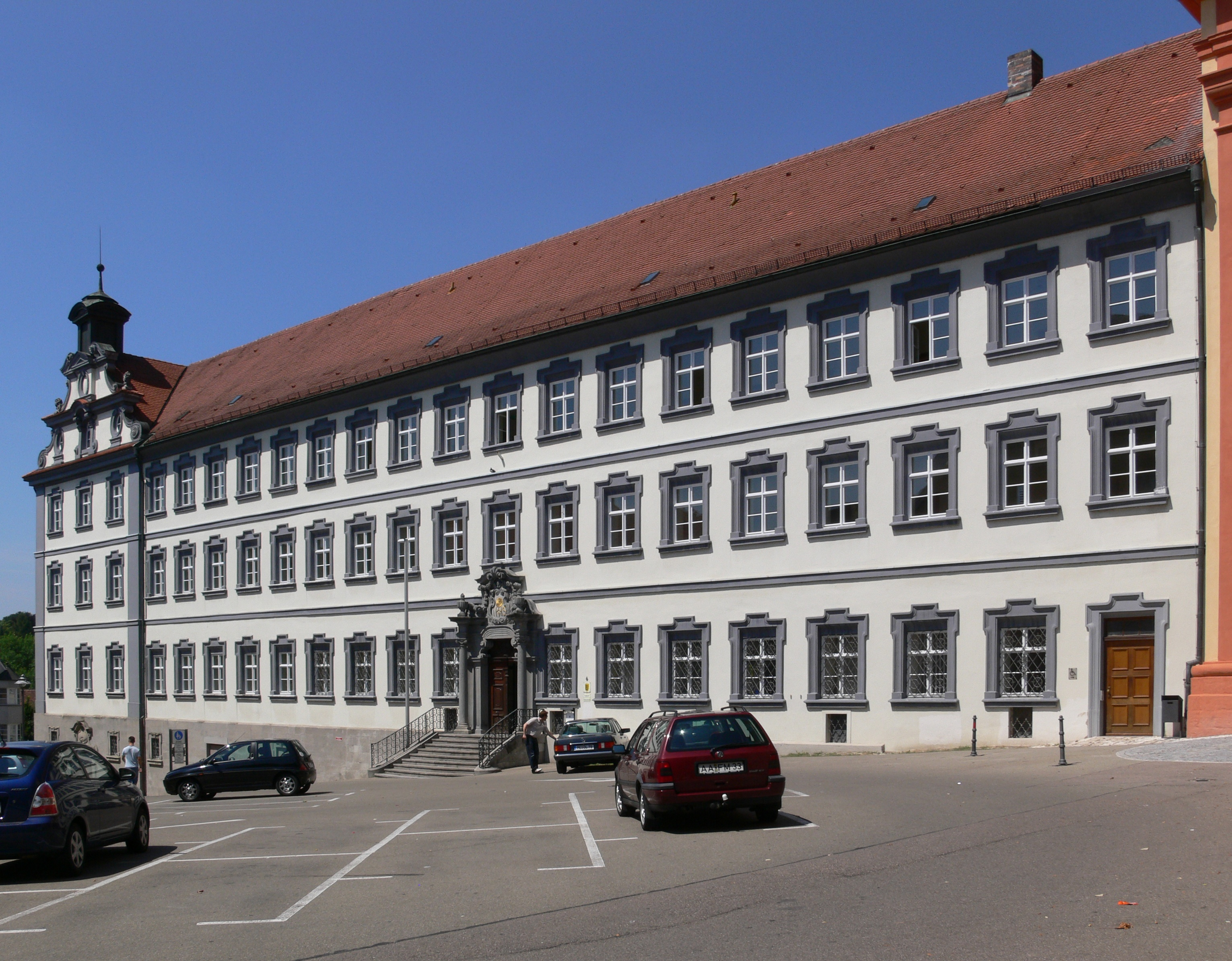 Ellwangen (Jagst), ehemaliges Jesuitenkolleg